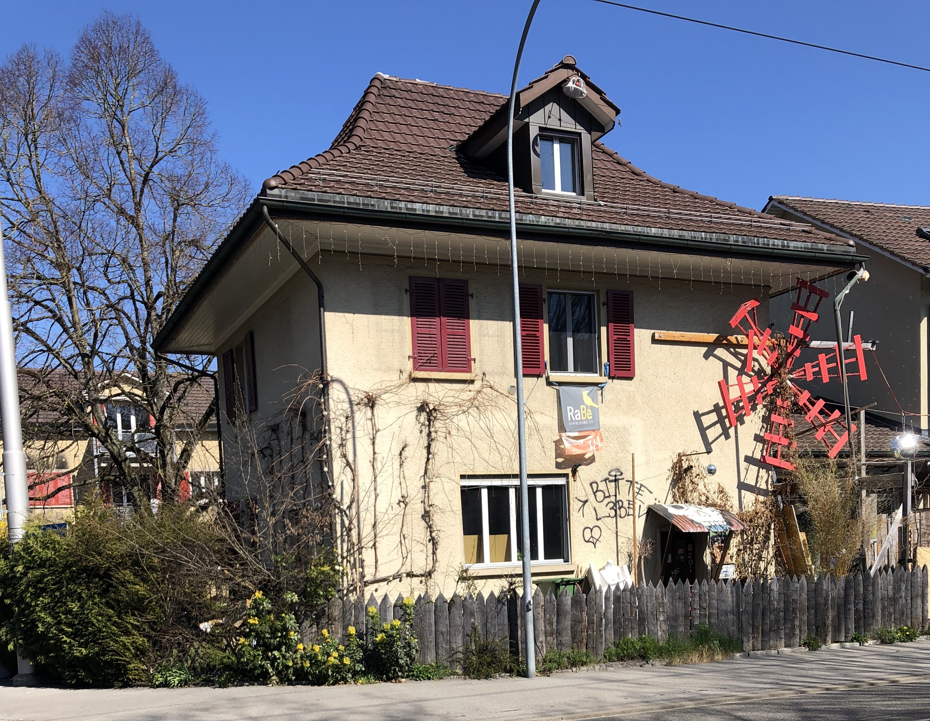 Winterhale Bebaung Siedlung